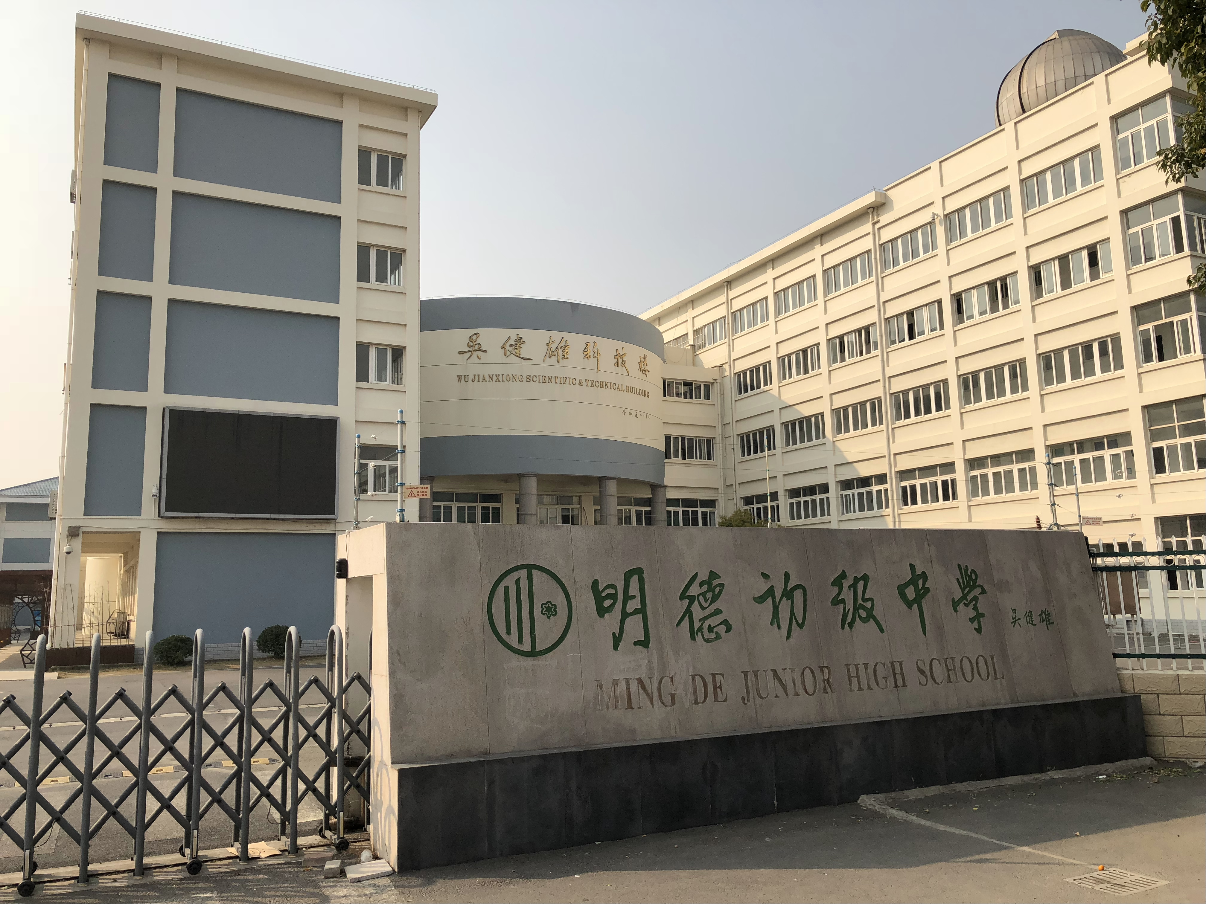 中文（中国大陆）: 浏河镇 明德中学